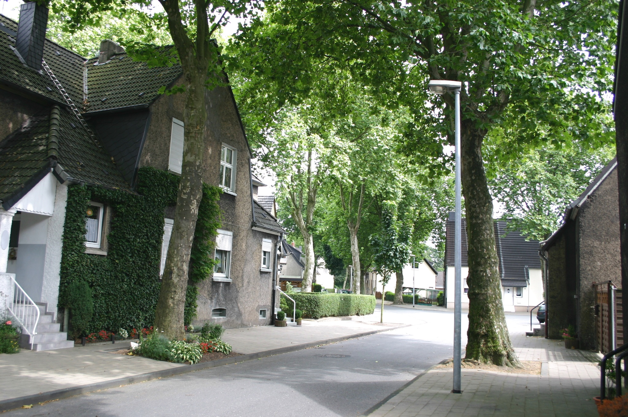 Siedlung Vondern (Oberhausen-Osterfeld), Detailansicht 2